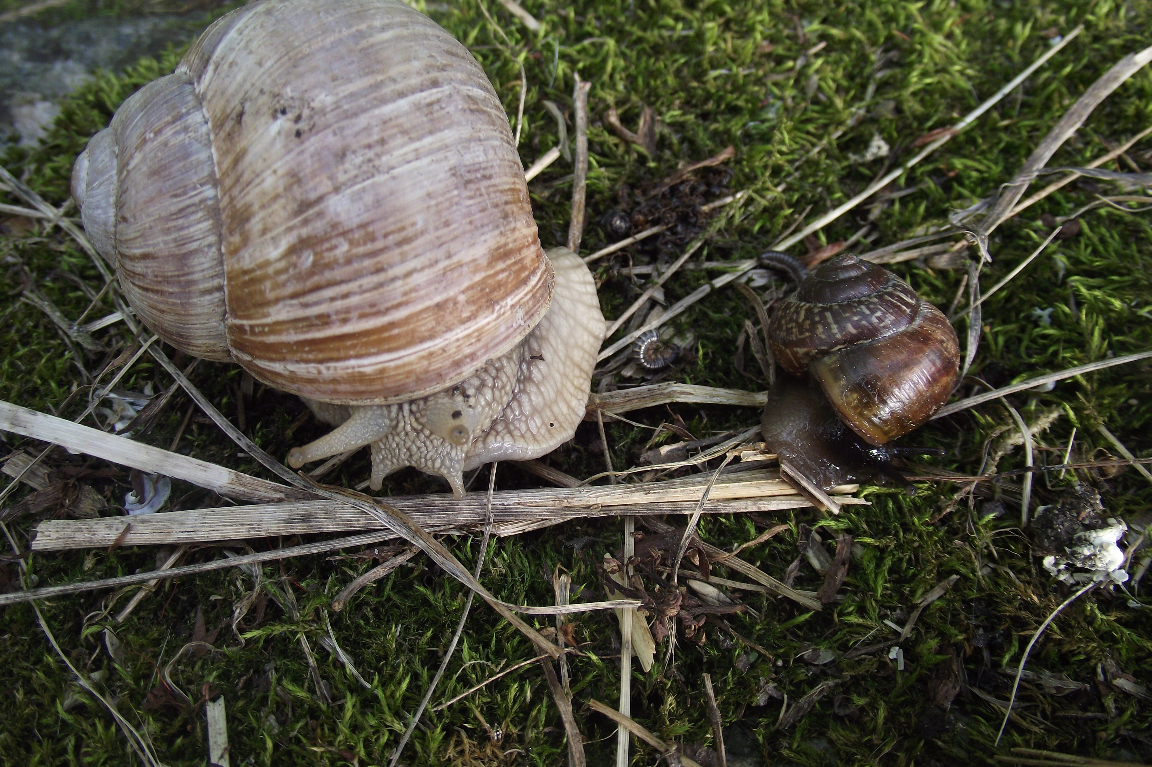 Rõngu vald